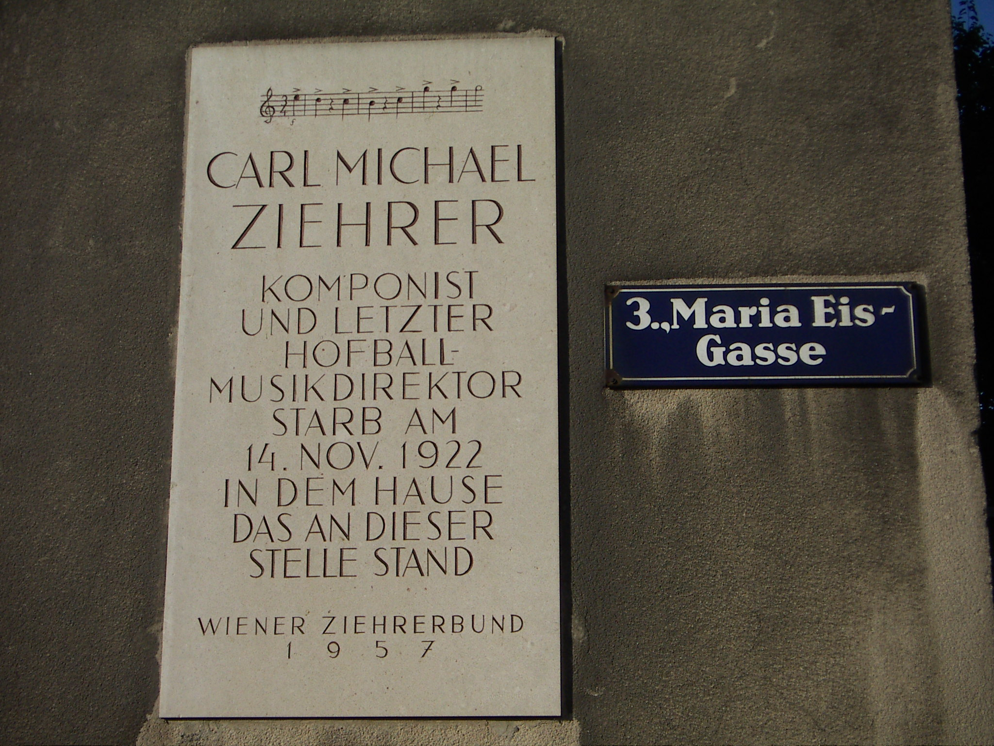 Carl Michael Ziehrer, Gedenktafel in Wien.